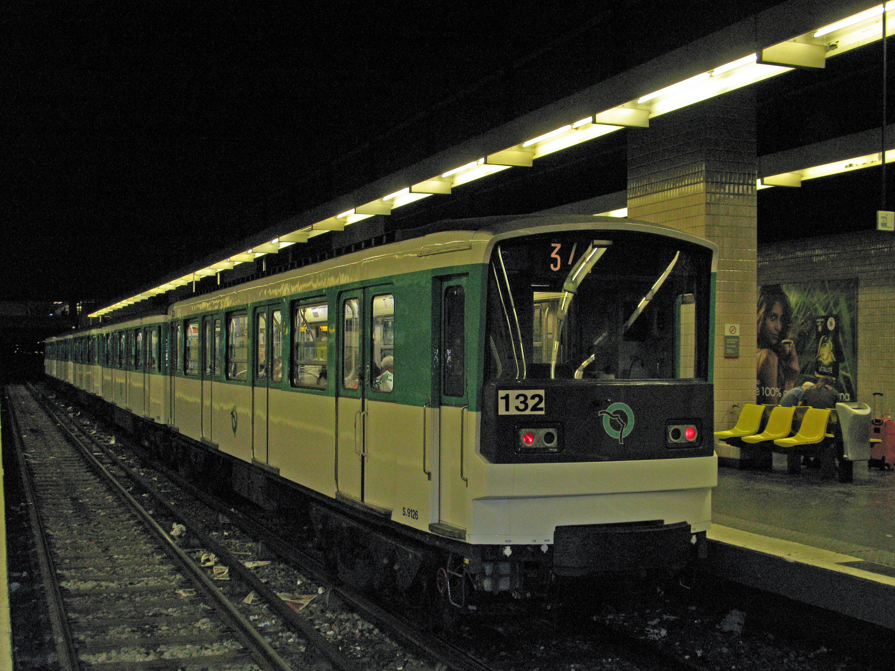 Rame MF 67 au terminus Gallieni de la ligne 3 du métro de Paris.